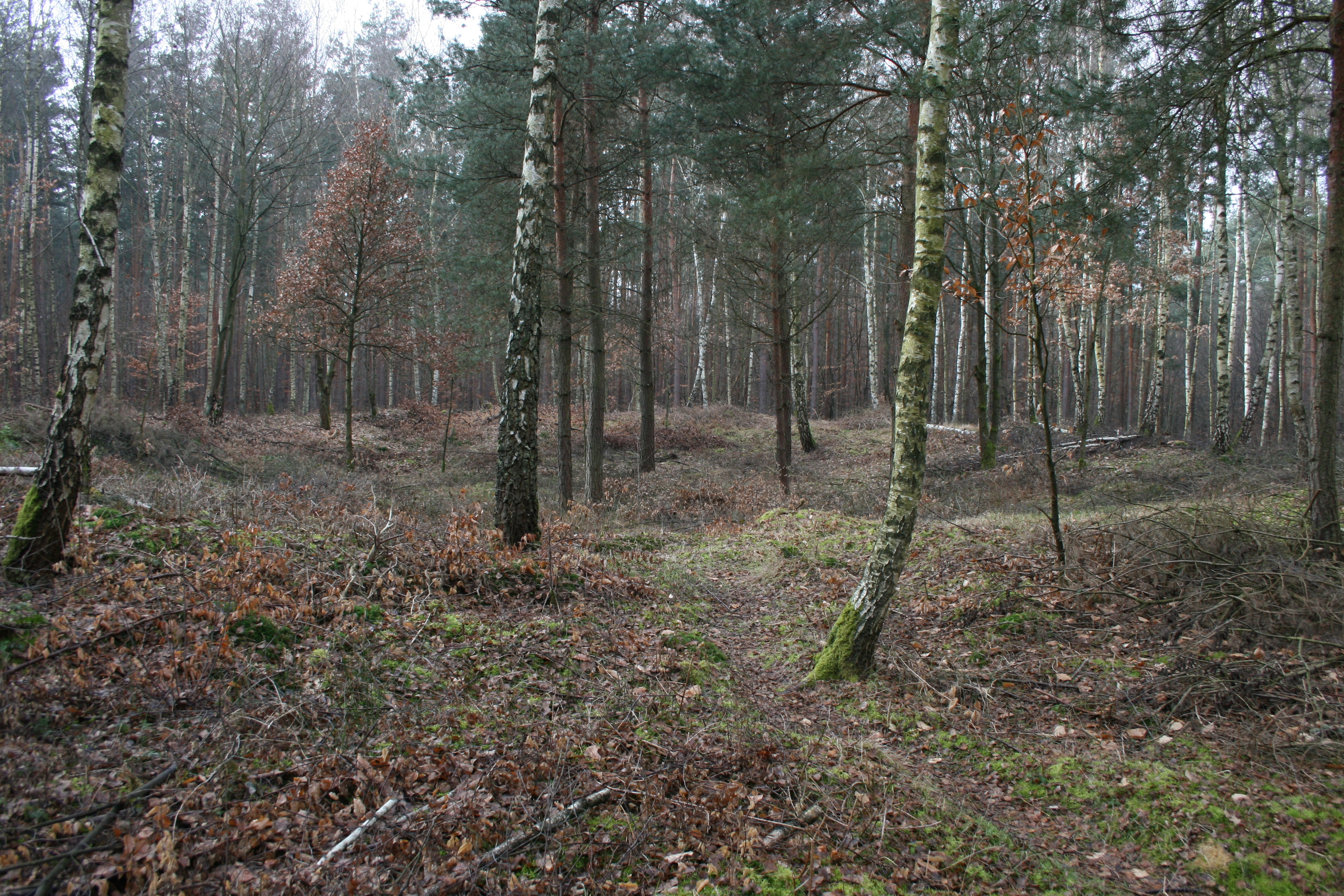 Kleinkastell Neuwirtshaus bei Hanau-Wolfgang, Hessen. Blick vom Tor in den Innenraum des Kastells.